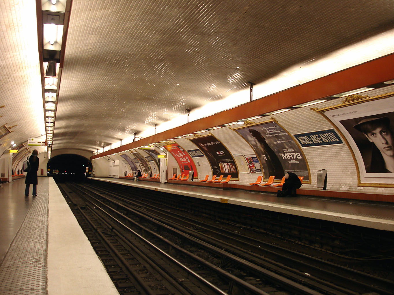 La station Michel-Ange - Auteuil de la ligne 9 du métro de Paris, France